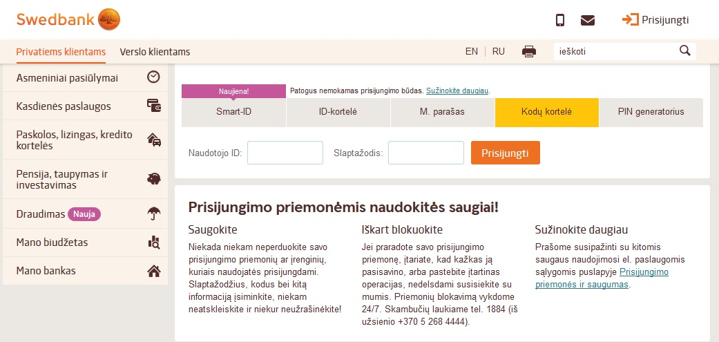 Prisijungimas prie interneto banko